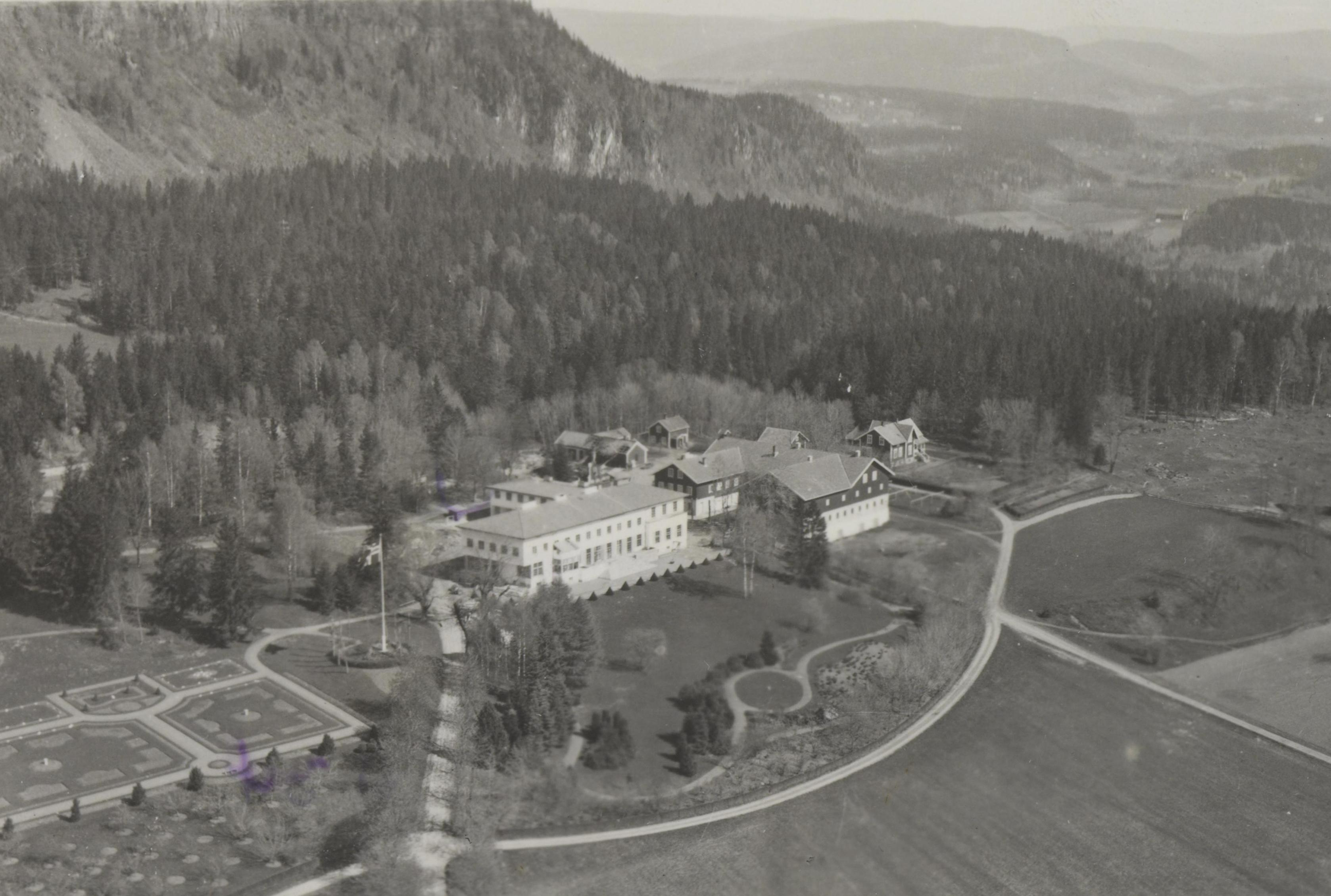 Bildet er hentet fra Nasjonalbibliotekets bildesamling Skaugum, Asker, Akershus